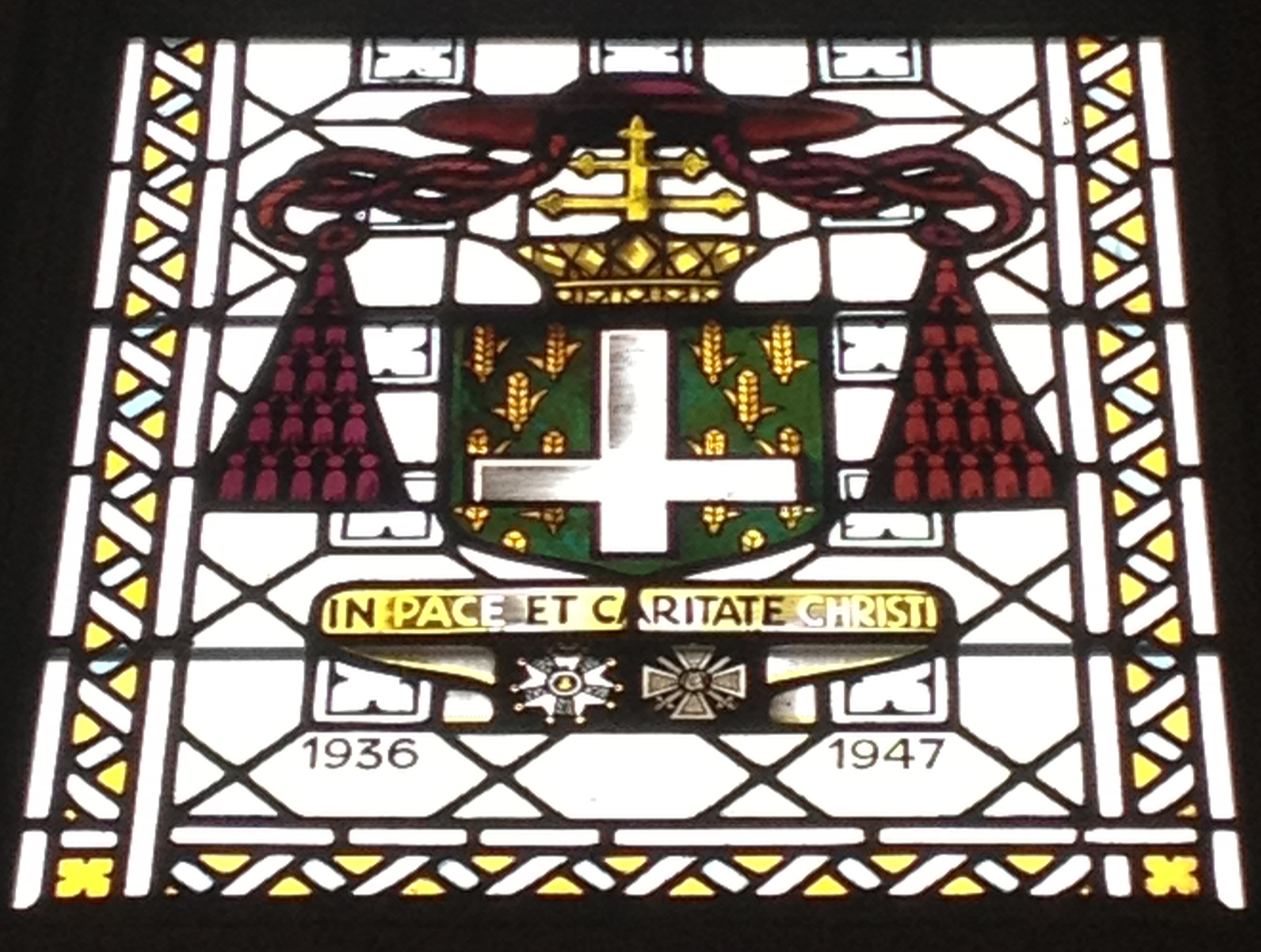 Armoiries en vitrail de Pierre Petit de Julleville, dans la salle des États de l'archevêché.